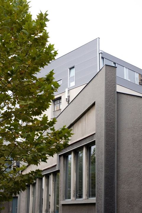 Зграда ФПН-а сликана споља и са стране.